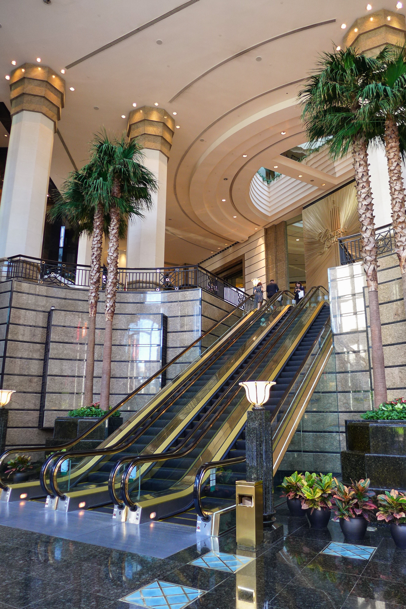 Central Plaza Entrance Lobby